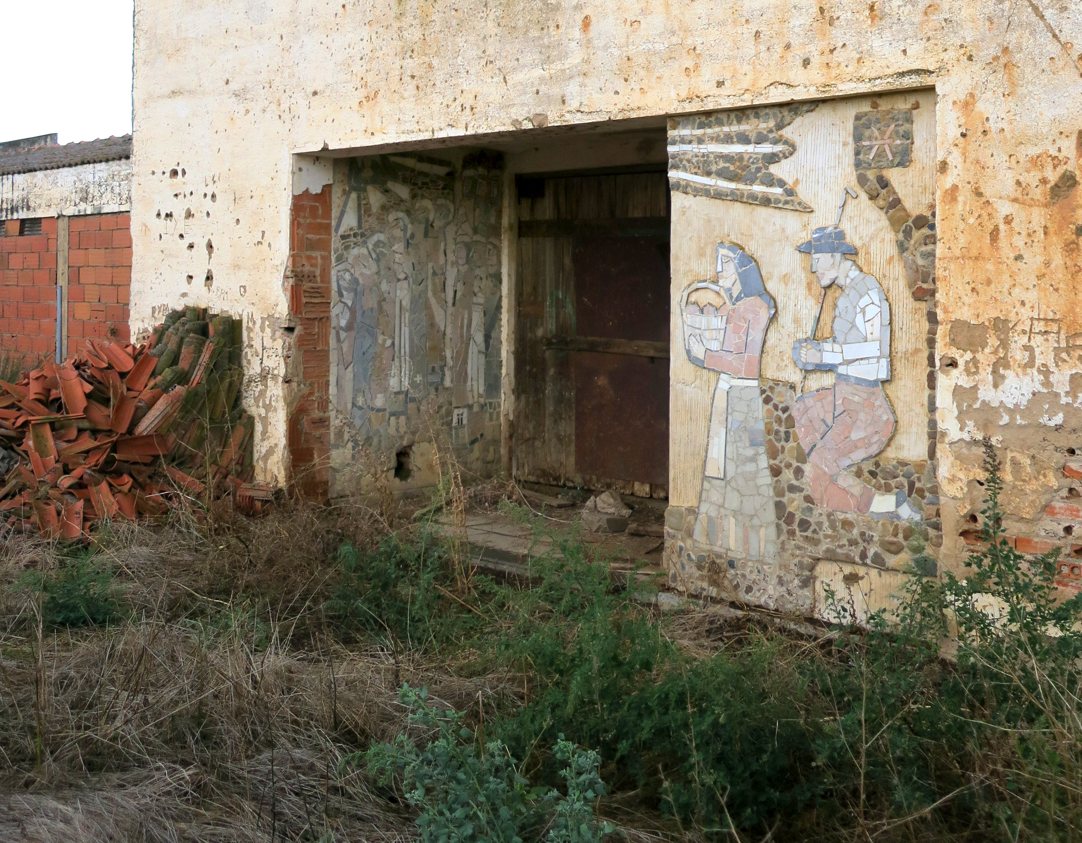 "Casas Aisladas de Valdebótoa" (Badajoz). Aspecto general del porche de la capilla escuela en octubre de 2018.